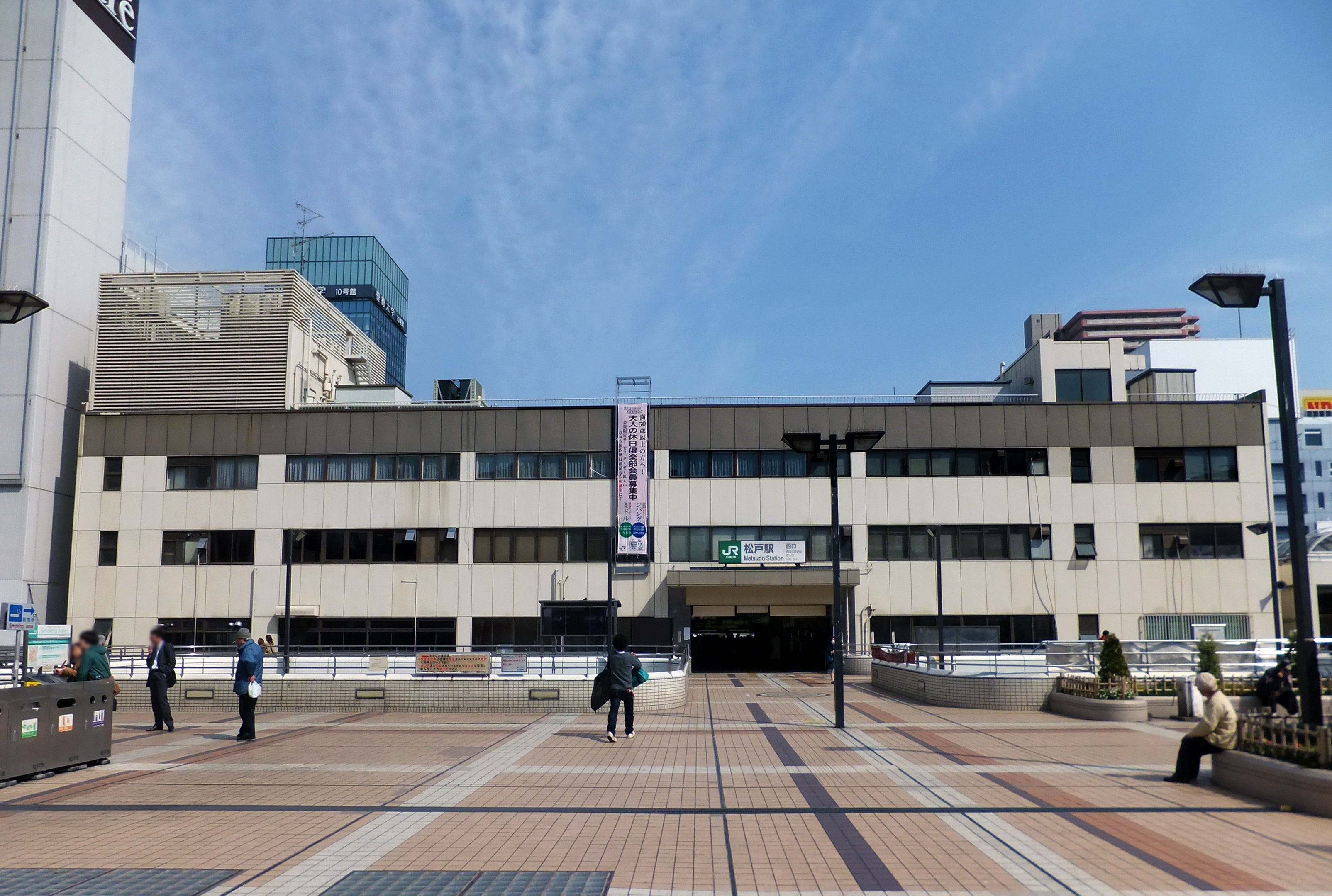 松戸駅西口デッキ(cropped)